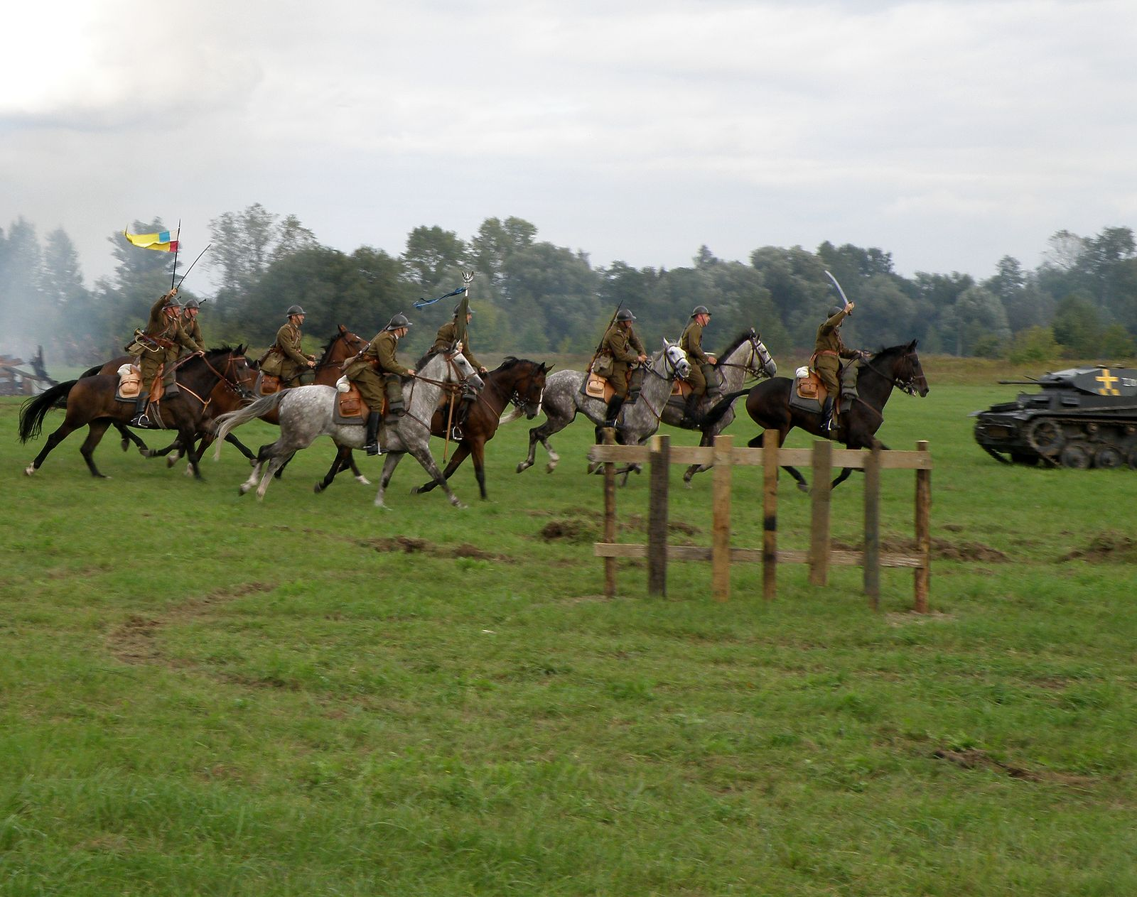 Bitwa pod Łomiankami, rekonstrukcja 10.09.2011